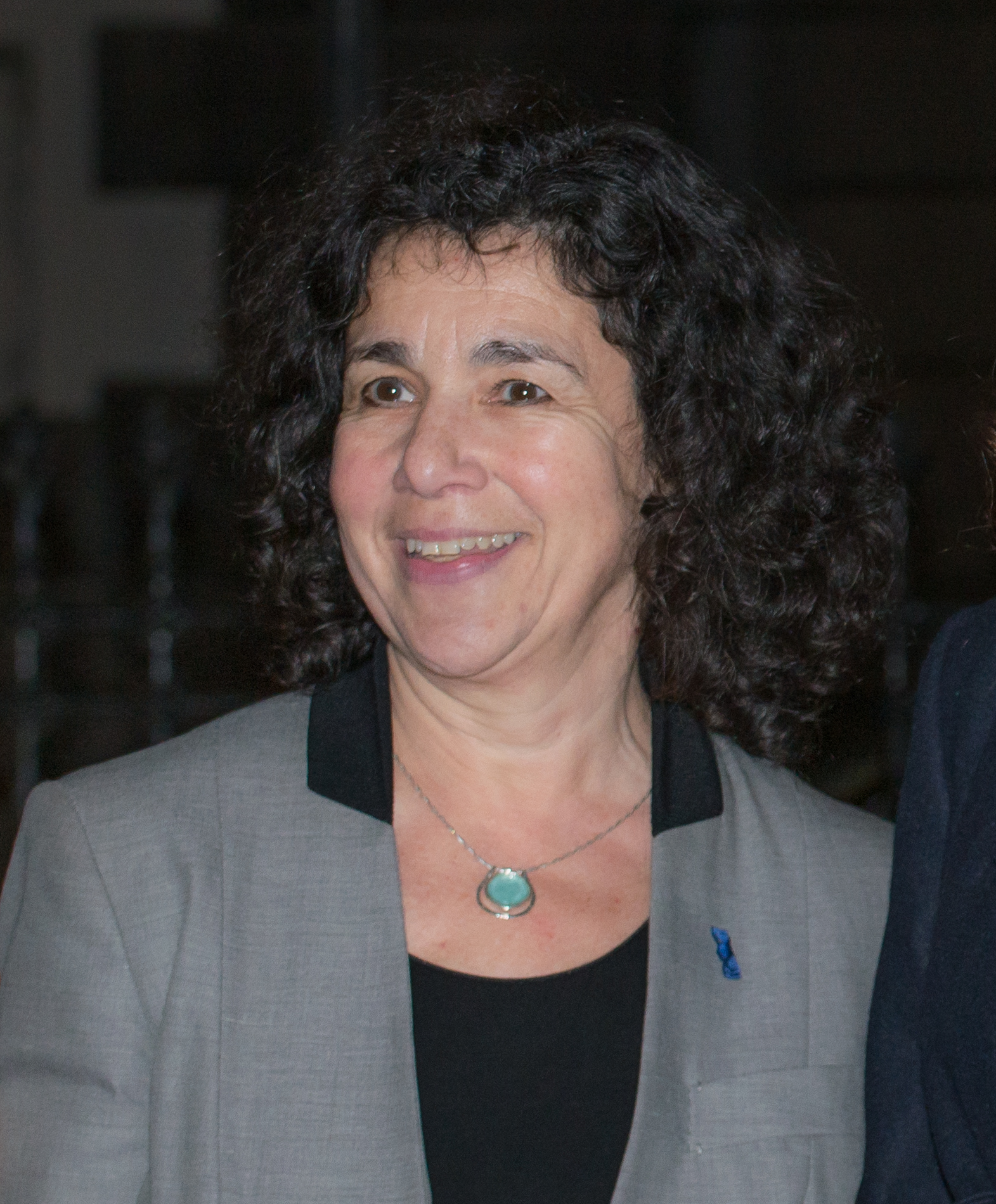 Lena Posner Körösi on Holocaust Remembrance Day, January 27, 2016.